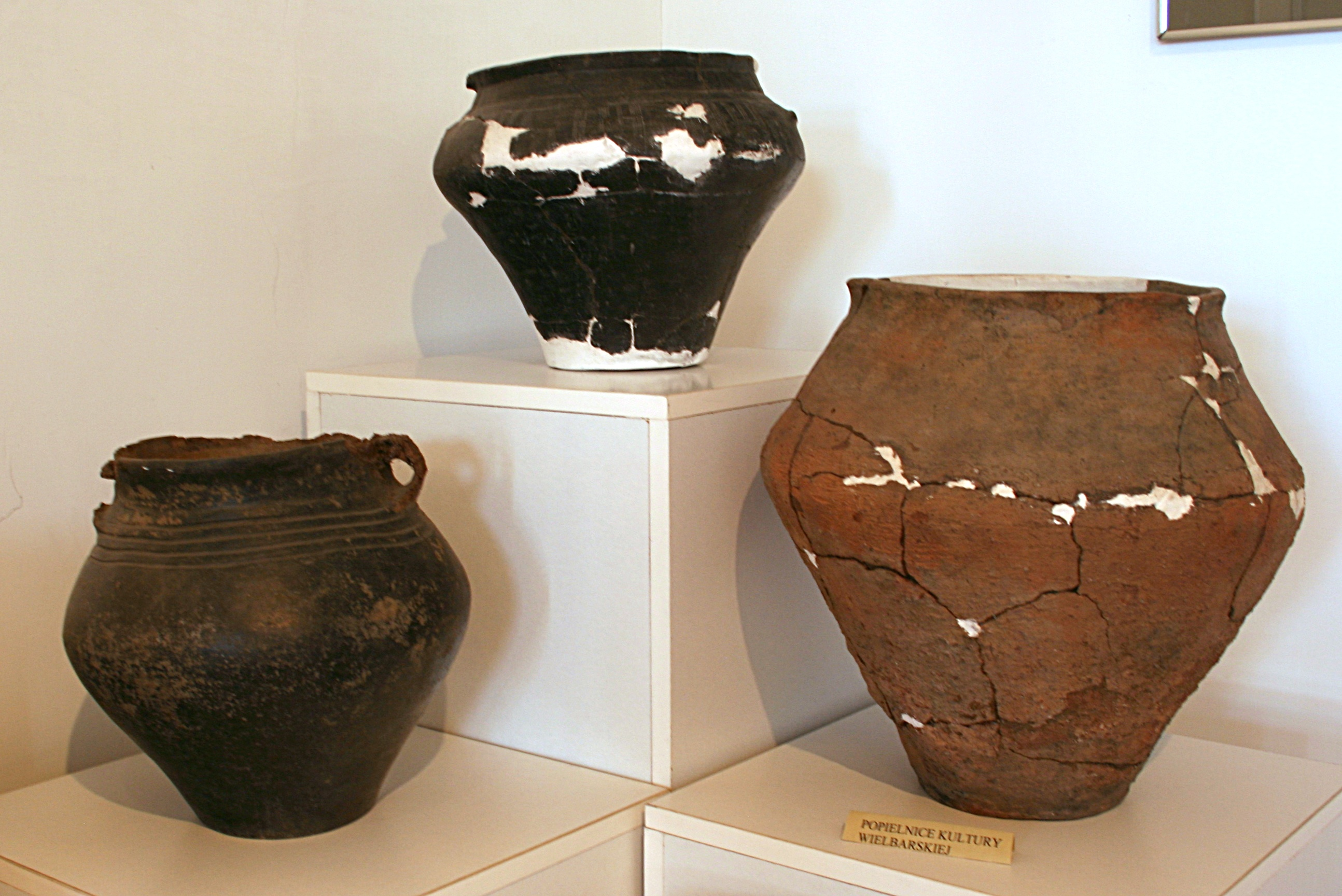 Popielnice w muzeum w Odrach (oddział muzeum historyczno-etnograficznego w Chojnicach)